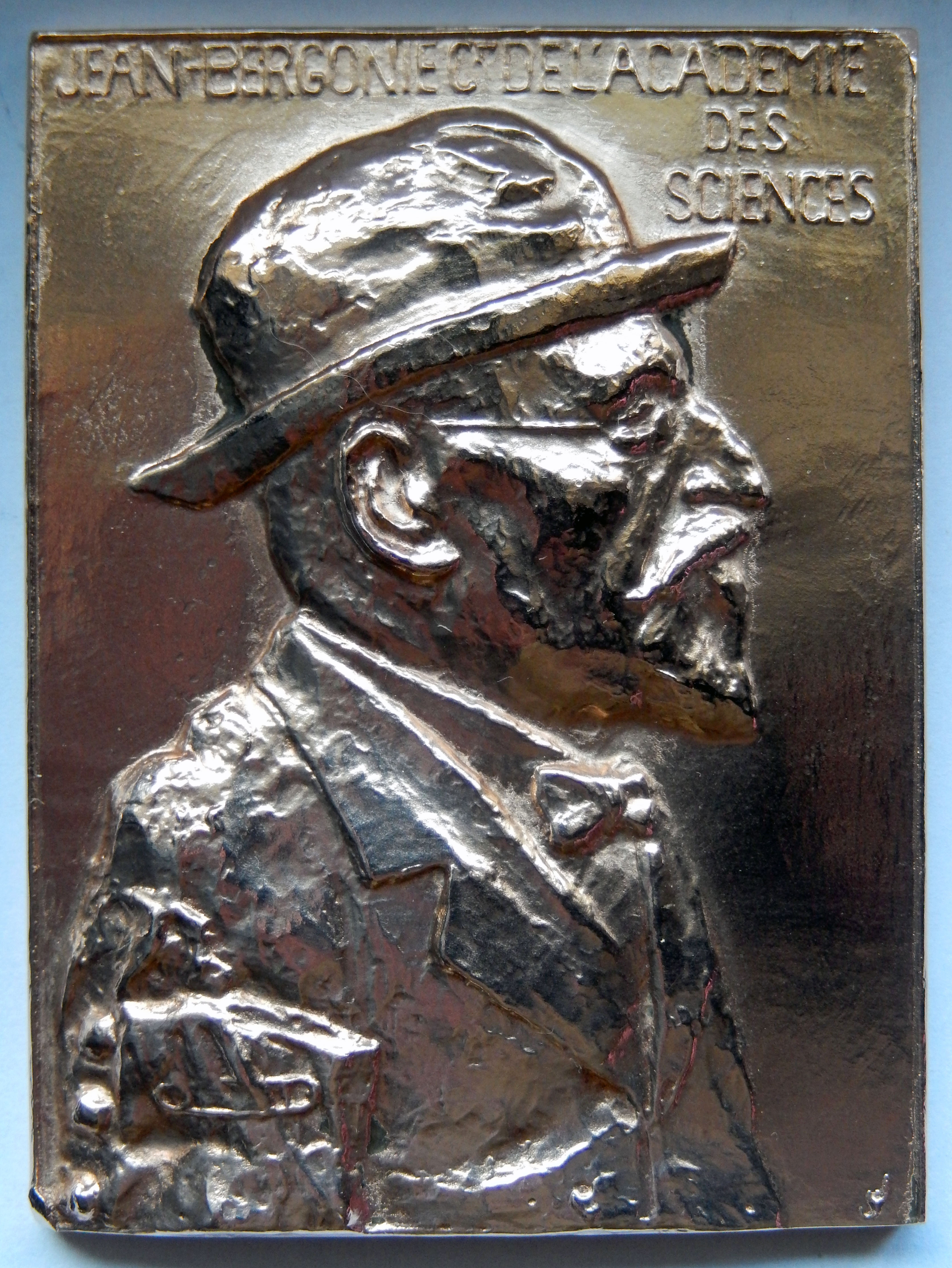 Médaille Jean BERGONIE (1857-1925) de l'académie des sciences. Graveur J. J. (JACOB ?). Bronze. Dimensions 70x52 mm, poids 162 grs.